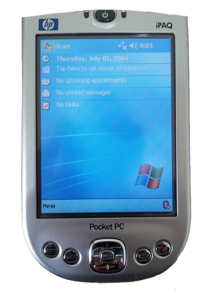 HP:n iPAQ 4150